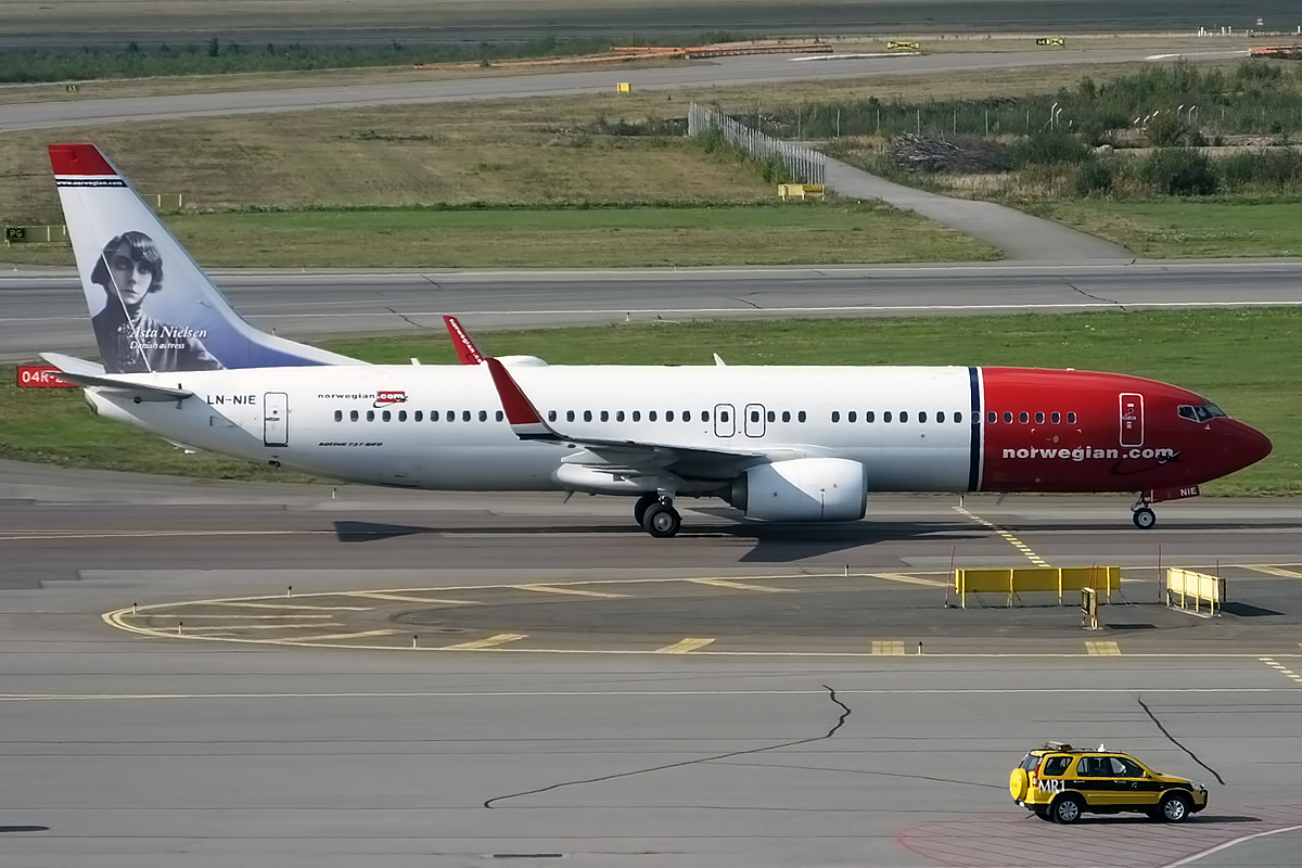 Norwegian (Asta Nielsen livery), LN-NIE, Boeing 737-8JP